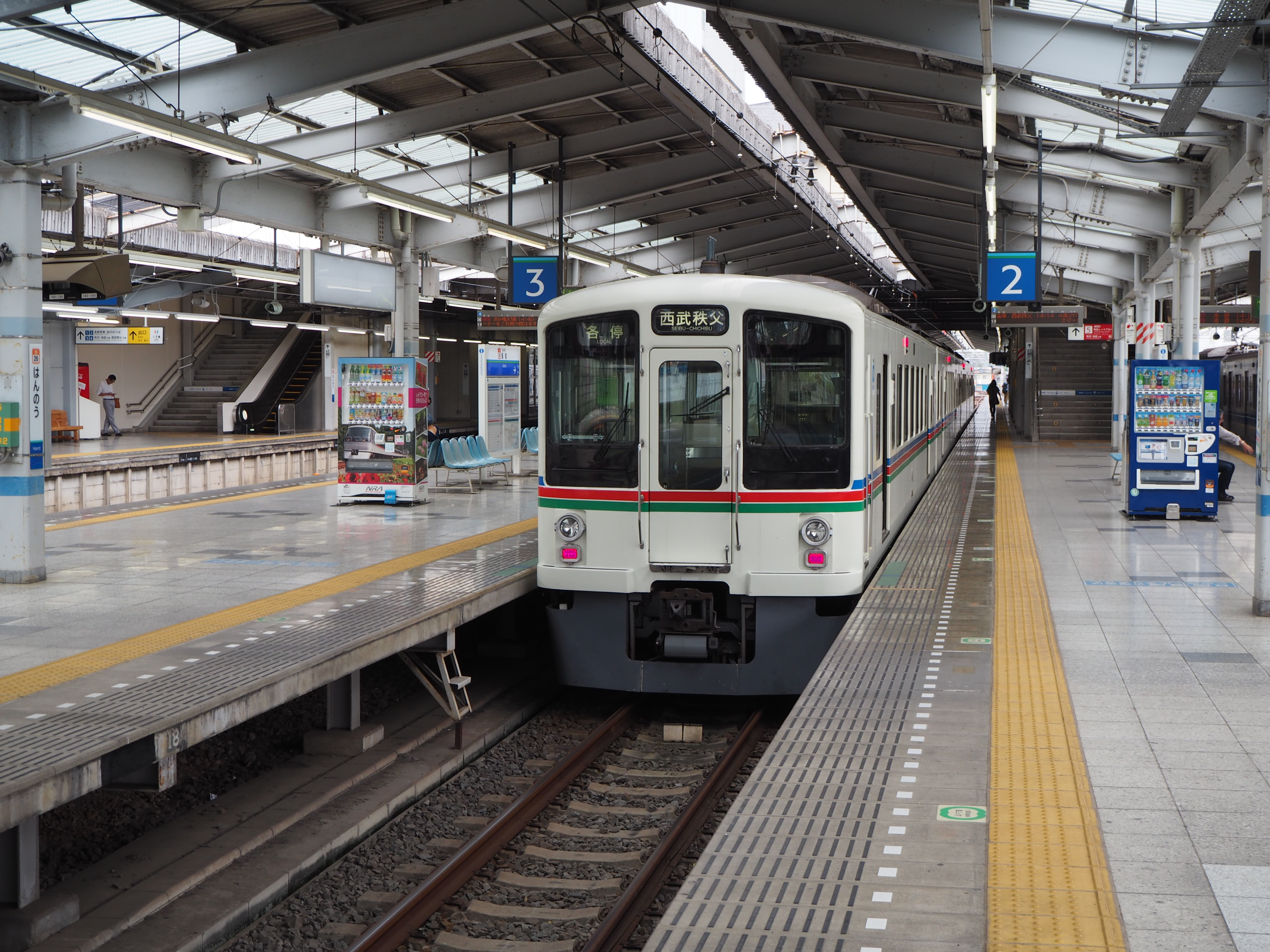 飯能駅に停車中の西武秩父駅行電車